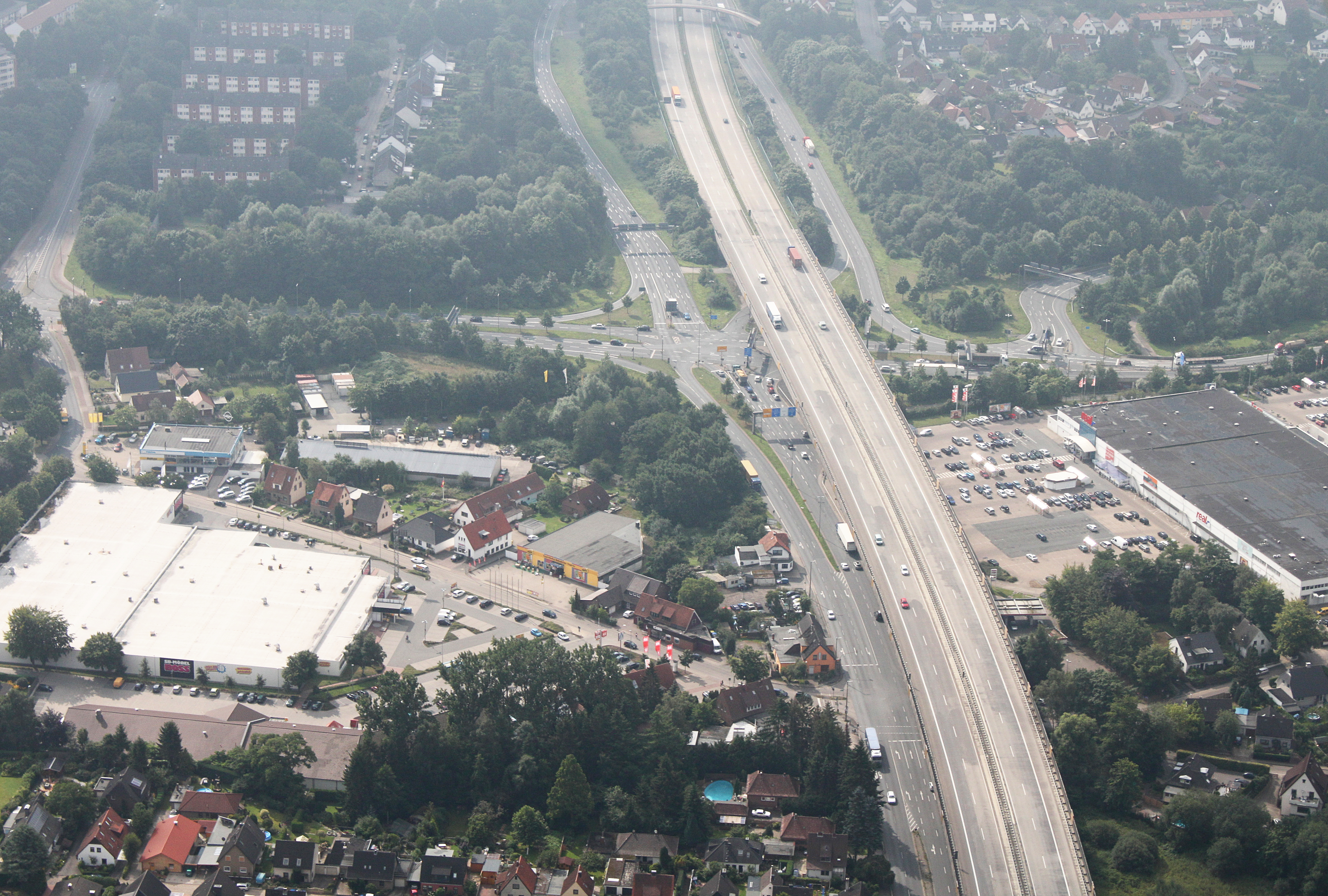 Fotoflug Bremen; Flughöhe 500 m; JVA Oslebshausen bis Abfahr Bremen Nord